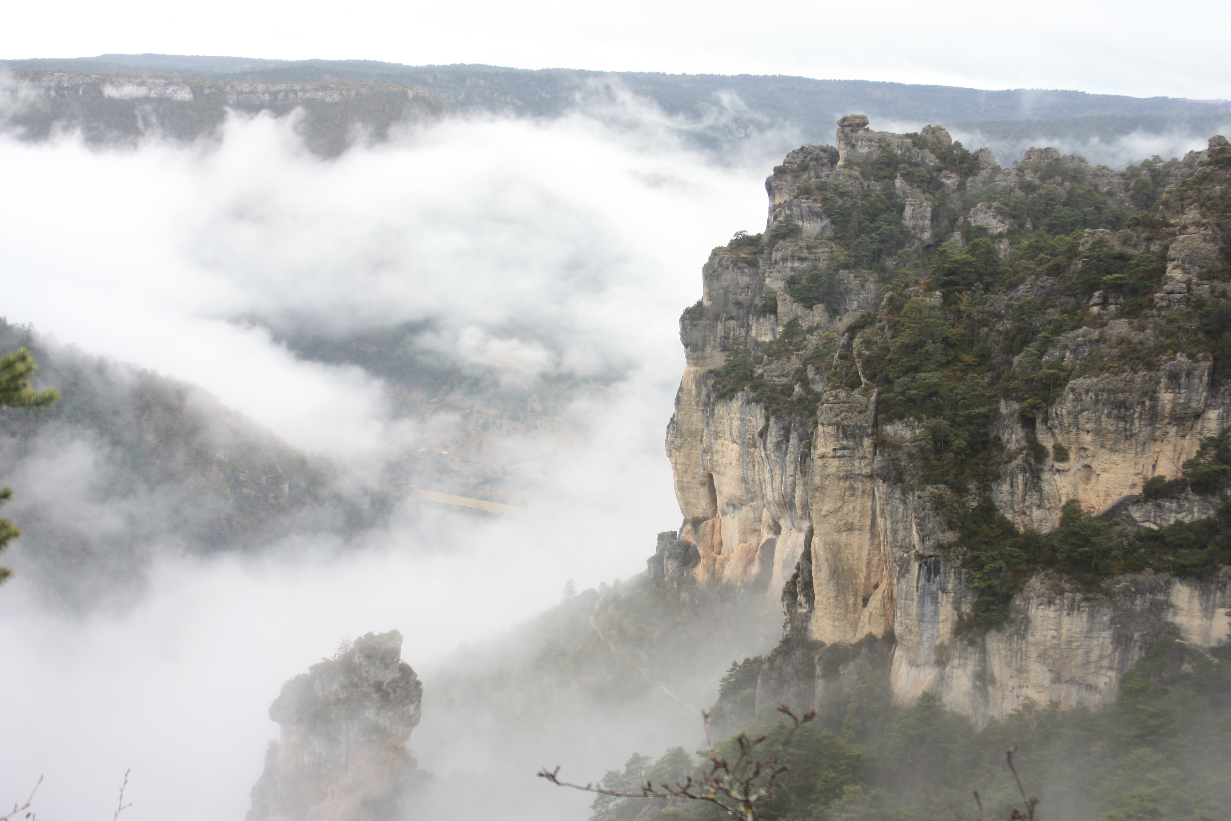 Du haut des gorges de la Jonte